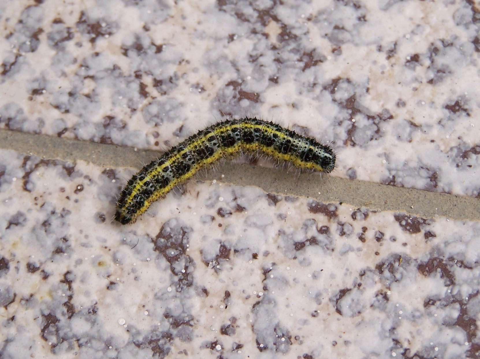 Lagarta em Melo, Serra da Estrela, Portugal